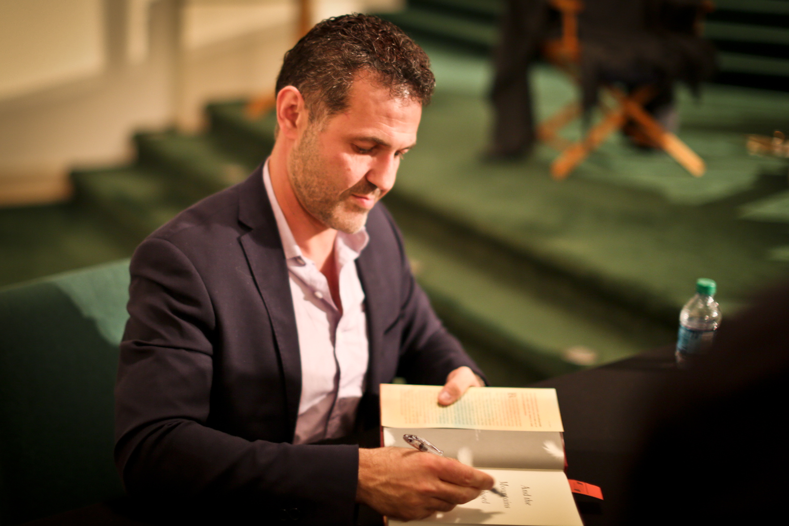 khaled hossein